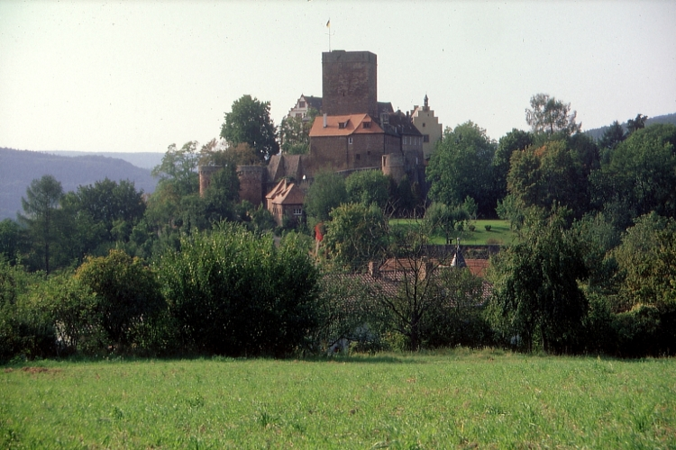 Gamburg